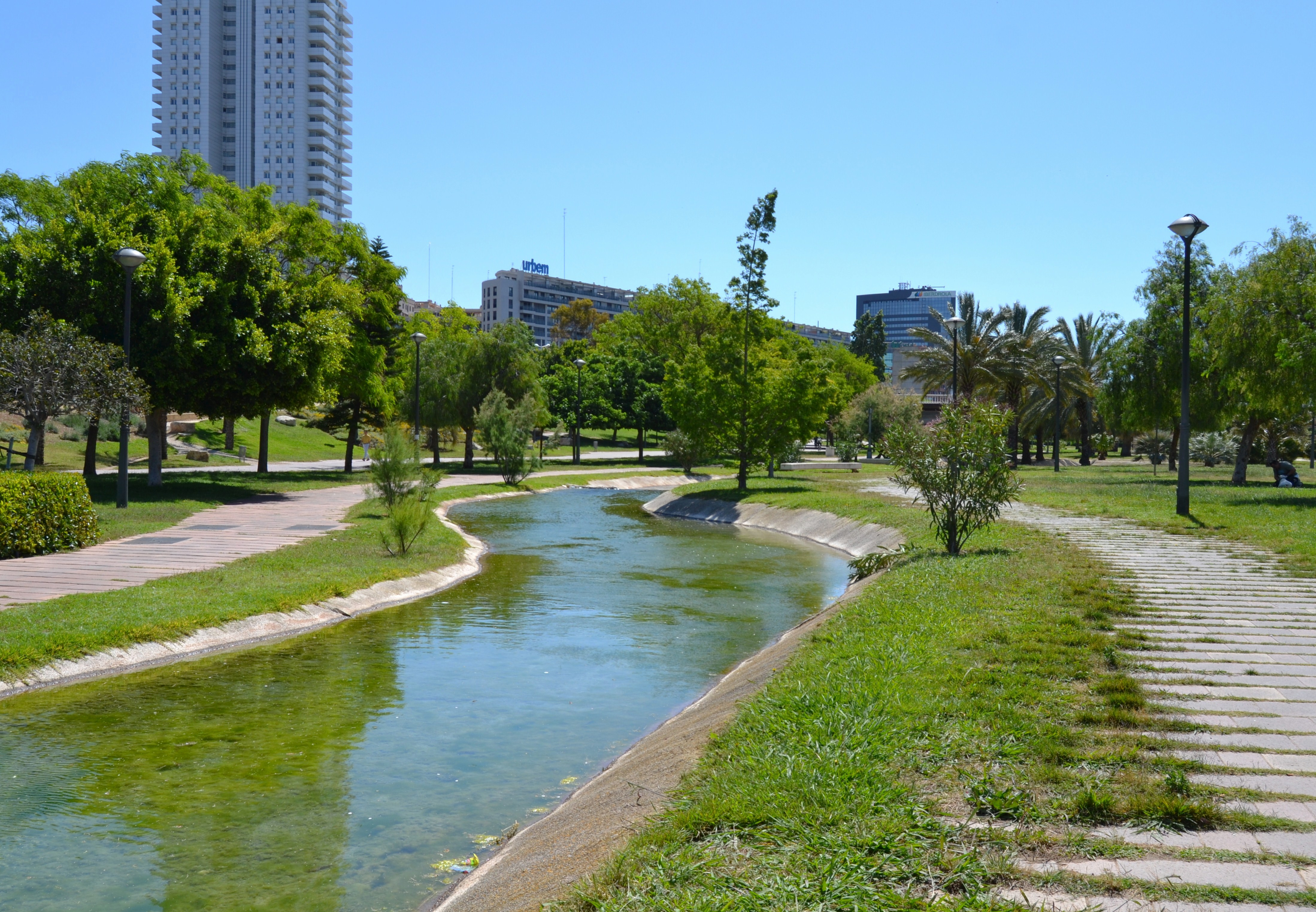 Jardí del Túria de València, riuet.